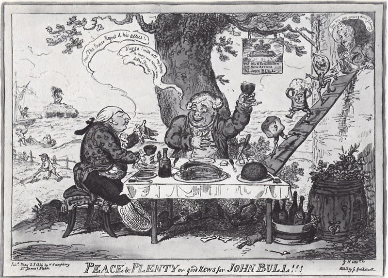 Nach der Abdankung Napoleons im Jahr 1814 und nach einer guten Ernte, konnte England (das eine Hungersnot hinter sich hatte) wieder aufatmen. Der englische König Ludwig XVIII. gibt John Bull ein Dinner, bei dem es zugeht wie im Schlaraffenland: die Waren wandern von selbst auf den Tisch. Im Hintergrund pflügt zweiter John Bull einen Acker und Waren werden aus einem Schiff ausgeladen. Napoleon sitzt verbittert auf einer Insel fest.